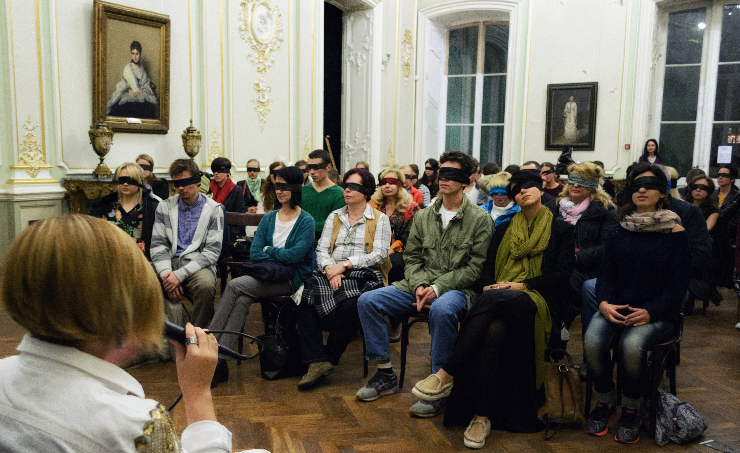 Зі сторони сцени